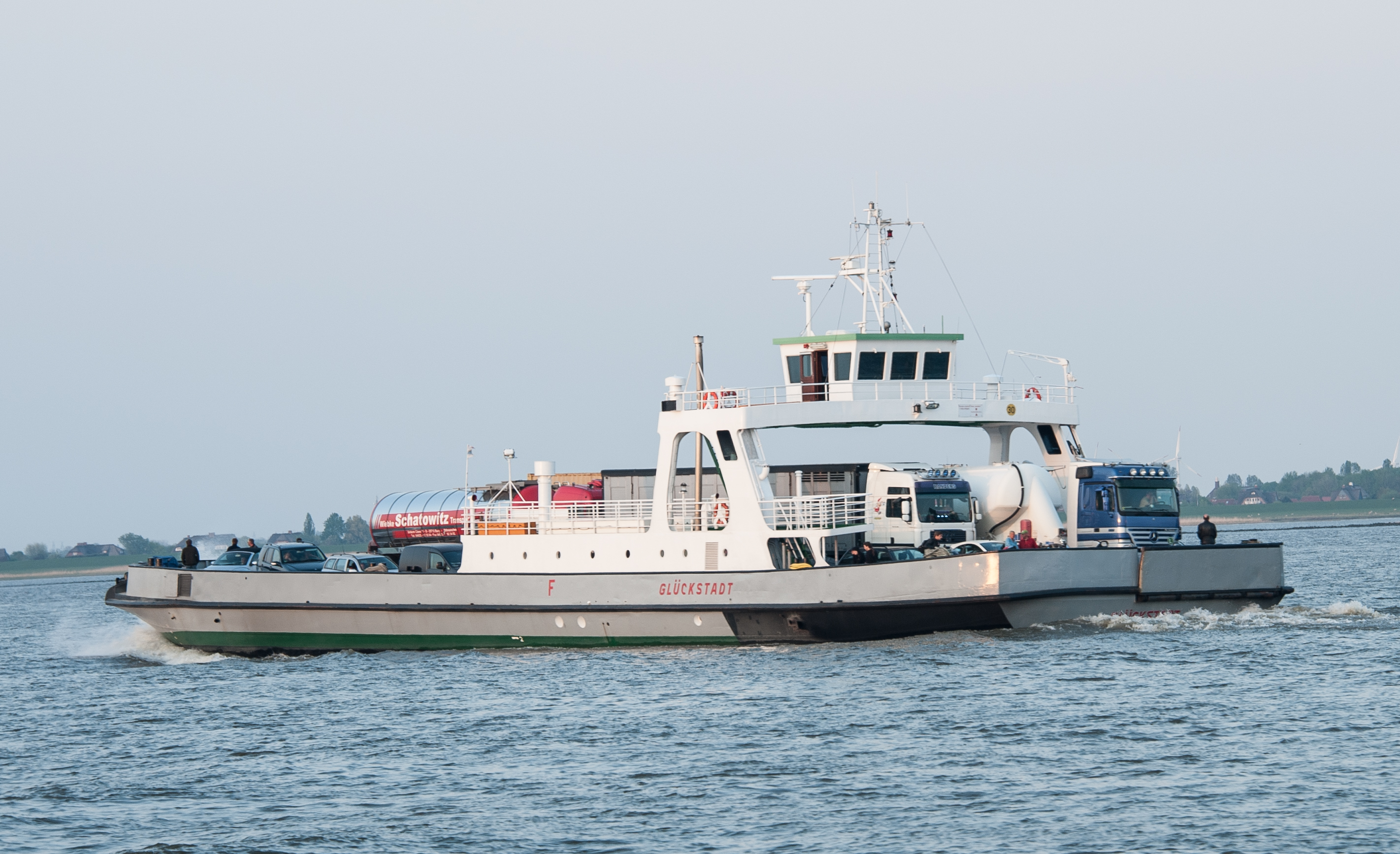 Fährschiff "Glückstadt" der Elbfährverbindung Wischhofen-Glückstadt